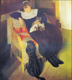 Neska eta katua, A. Larroque